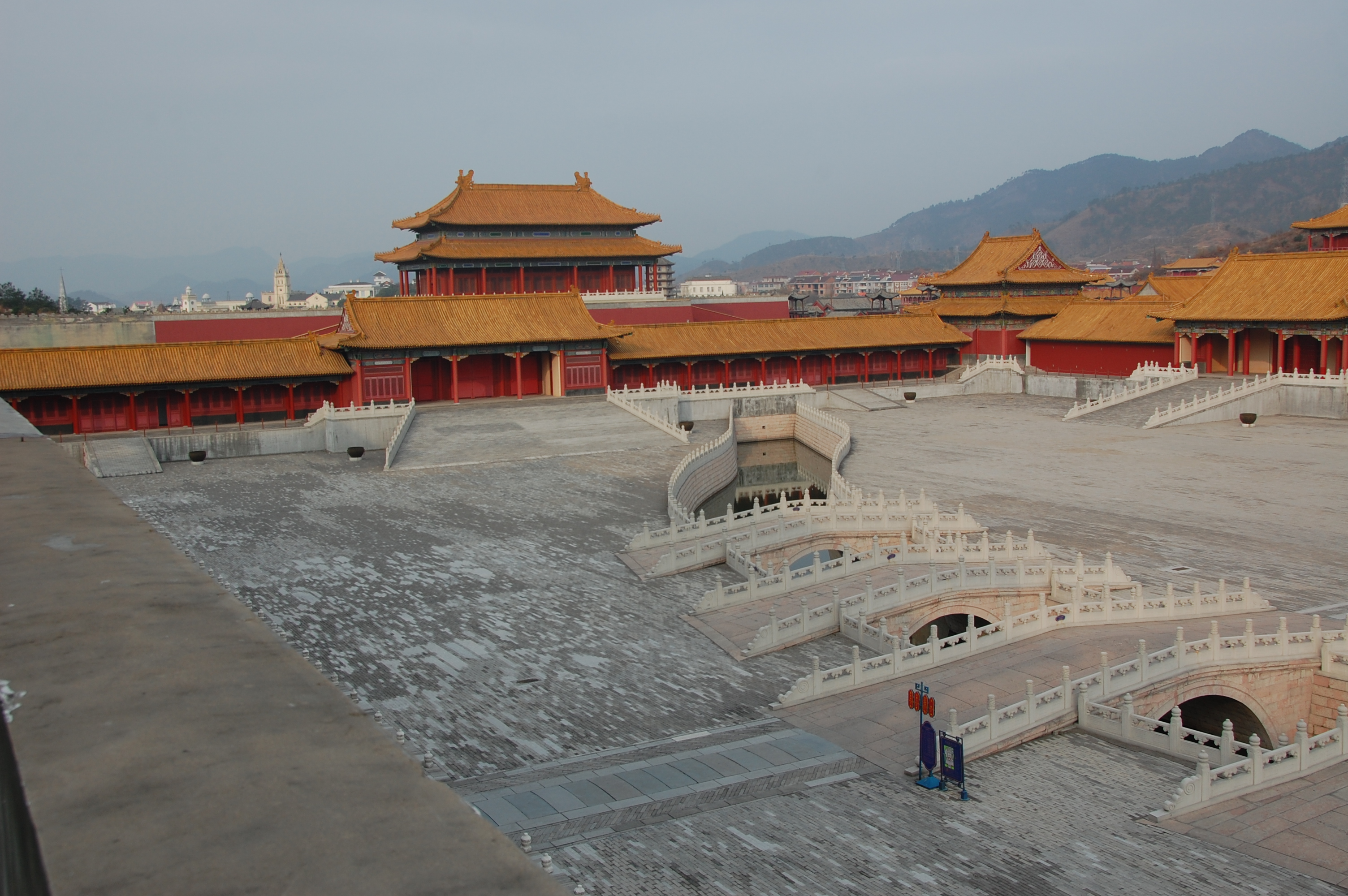 ????/Mingqing Palace/????